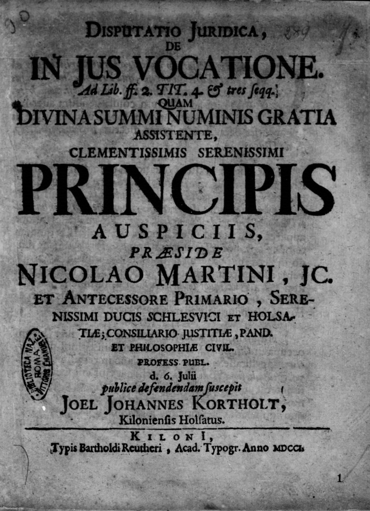 Frontespizio